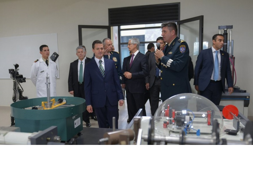 Laboratorio de la Escuela Militar de Ingenieros